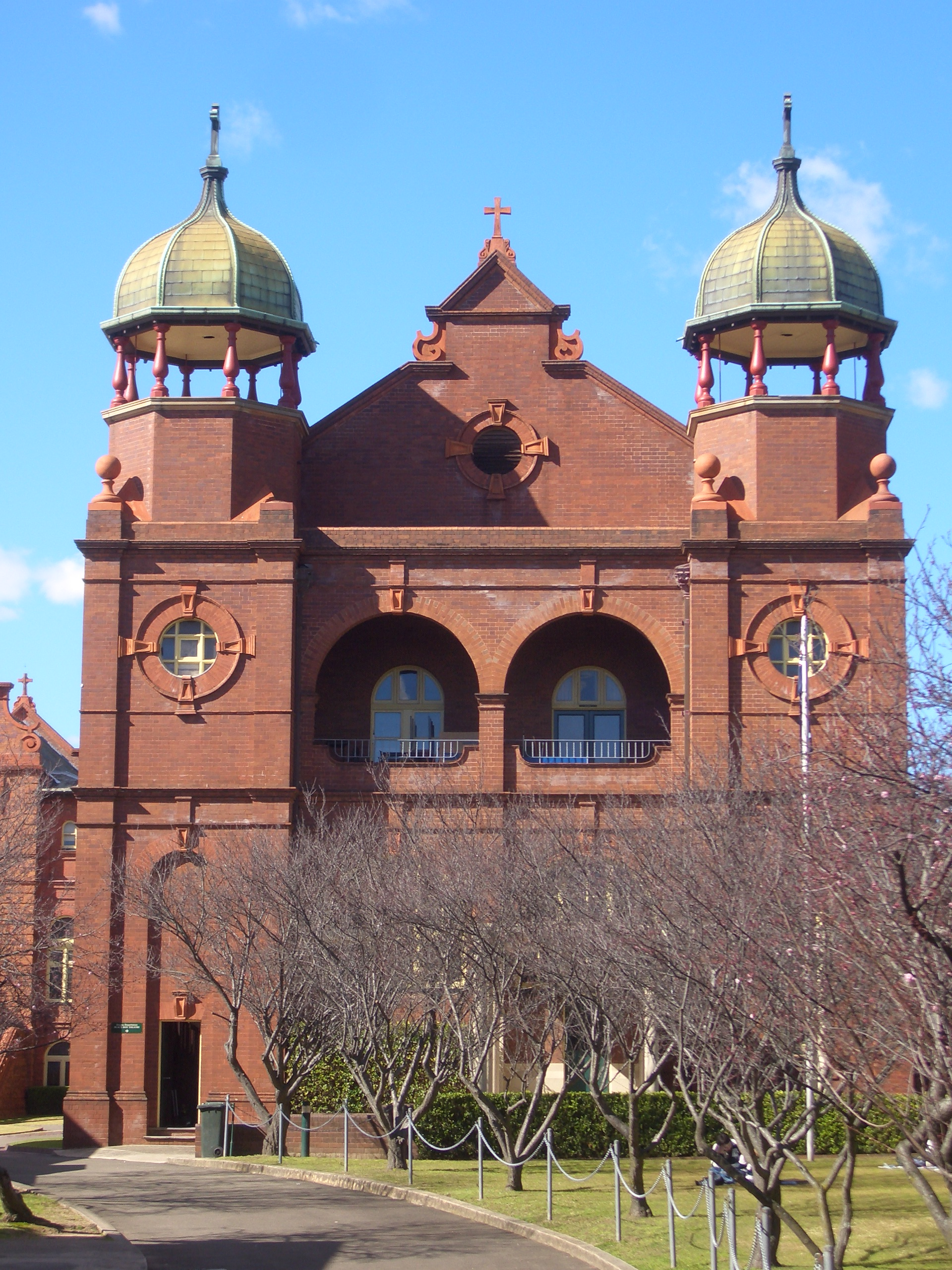 Santa Sabina College, Strathfield